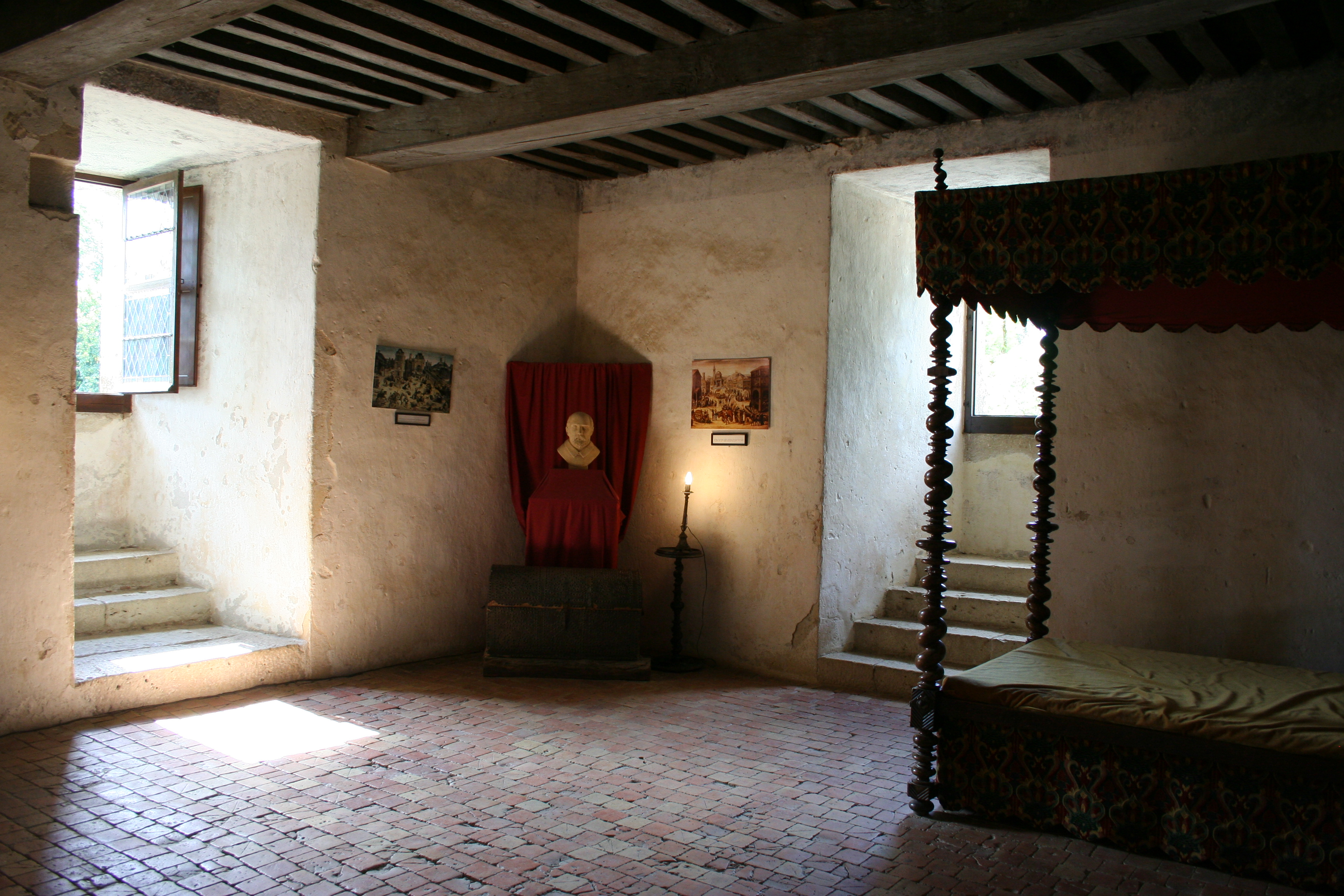 Chambre de Montaigne dans la tour du château de Montaigne.